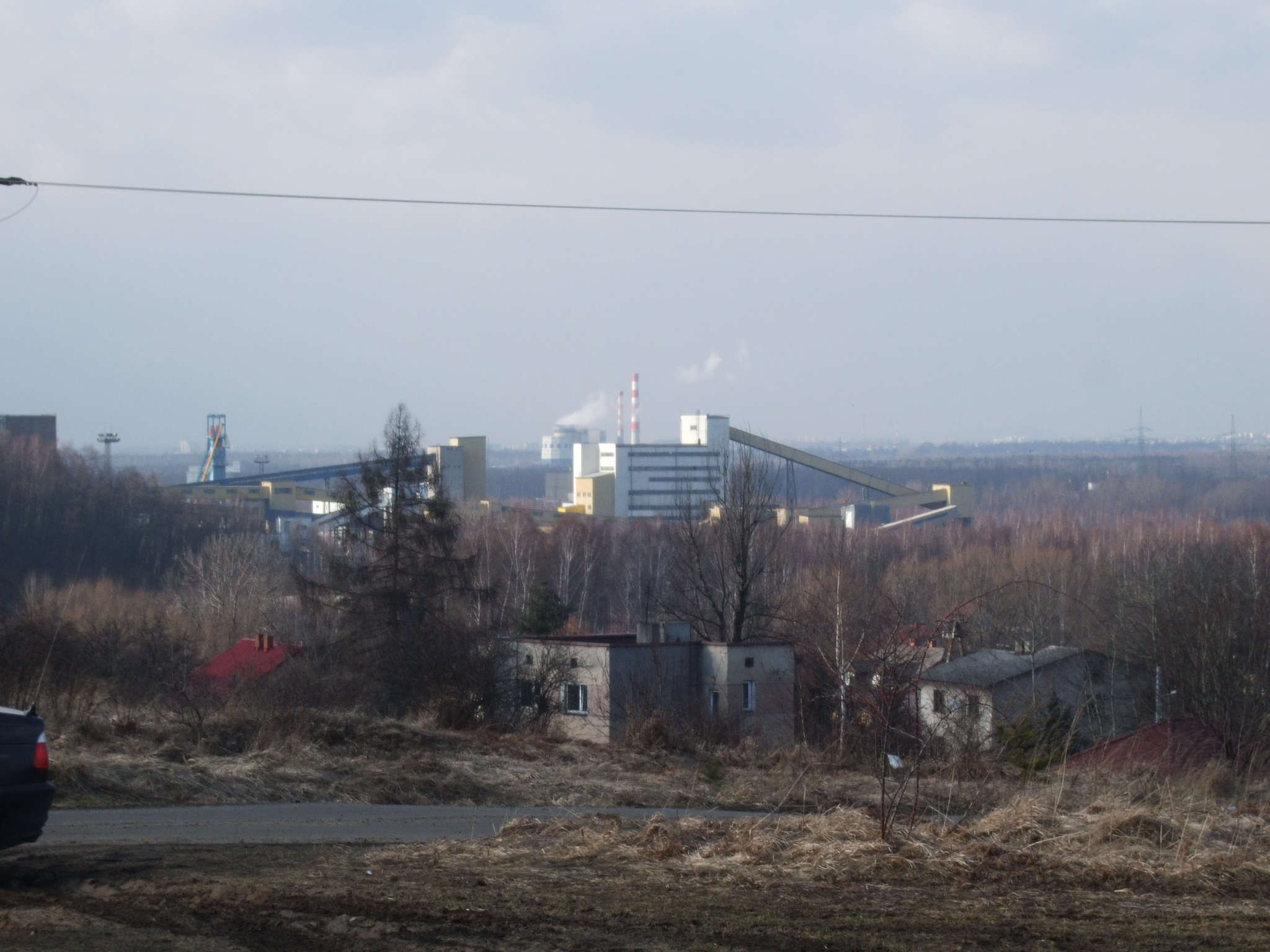 Południowy Koncern Węglowy S.A.; Zakład Górniczy Sobieski w Jaworznie.Kopalnia węgla kamiennego.Za kopalnią widoczne kominy i chłodnia Elektrownii Jaworzno II.